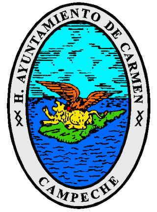 El escudo del Carmen es un óvalo limitado por una periferia en color gris que tiene el nombre de la ciudad y el estado al que pertenece. En el centro del óvalo se encuentra la Laguna de Términos y sobre ella la Isla del Carmen. El león simboliza el asedio europeo a México durante el dominio español y la intervención francesa, está sobre la isla y sobre él un águila lo hiere con el pico y las garras. El águila símboliza al pueblo carmelita, evitando que un país extranjero intervenga en su territorio y la nación.